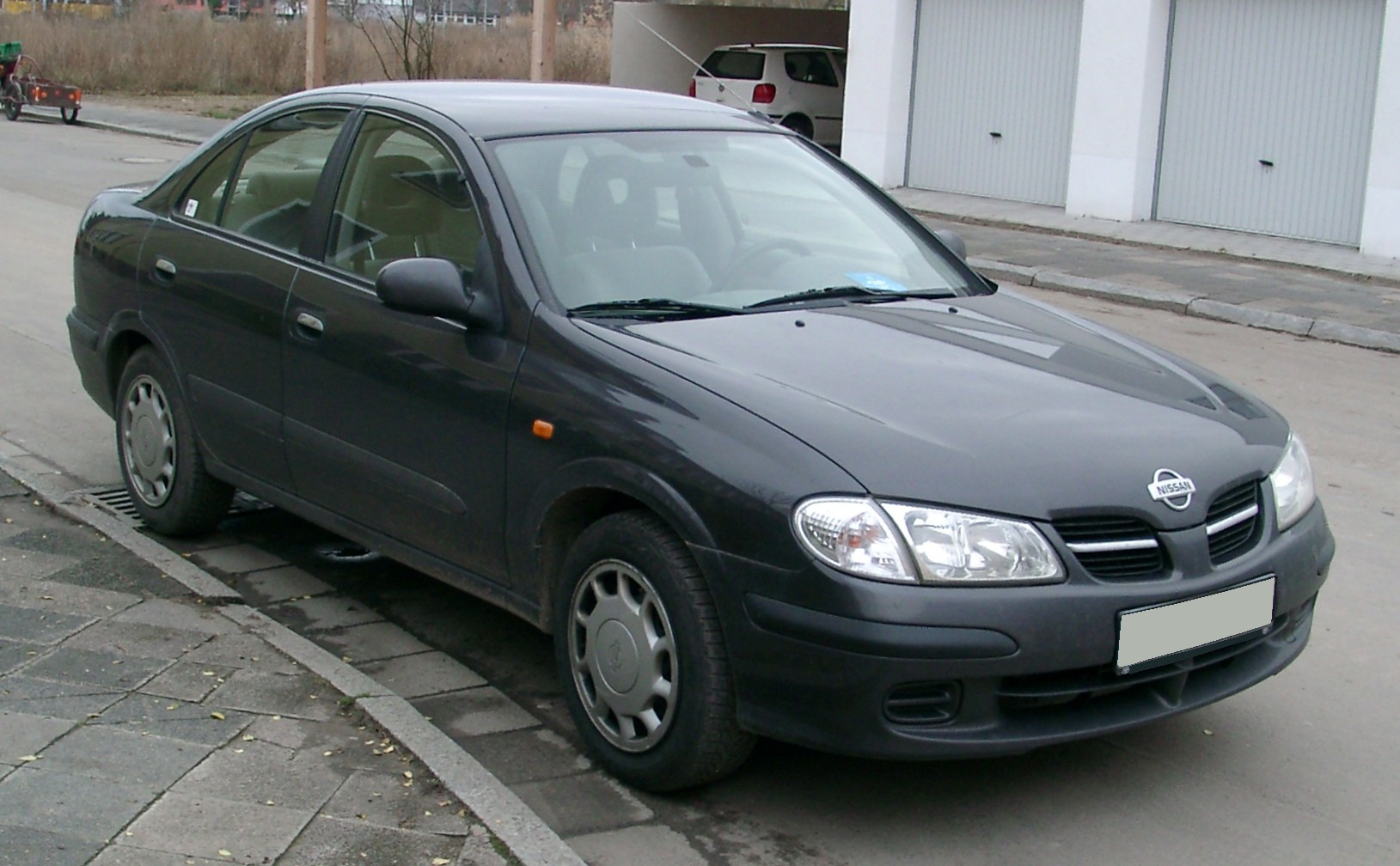 Nissan Almera